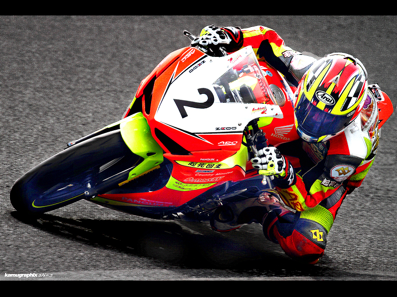 2015年 復帰参戦したCBR250R DREAM CUPにて